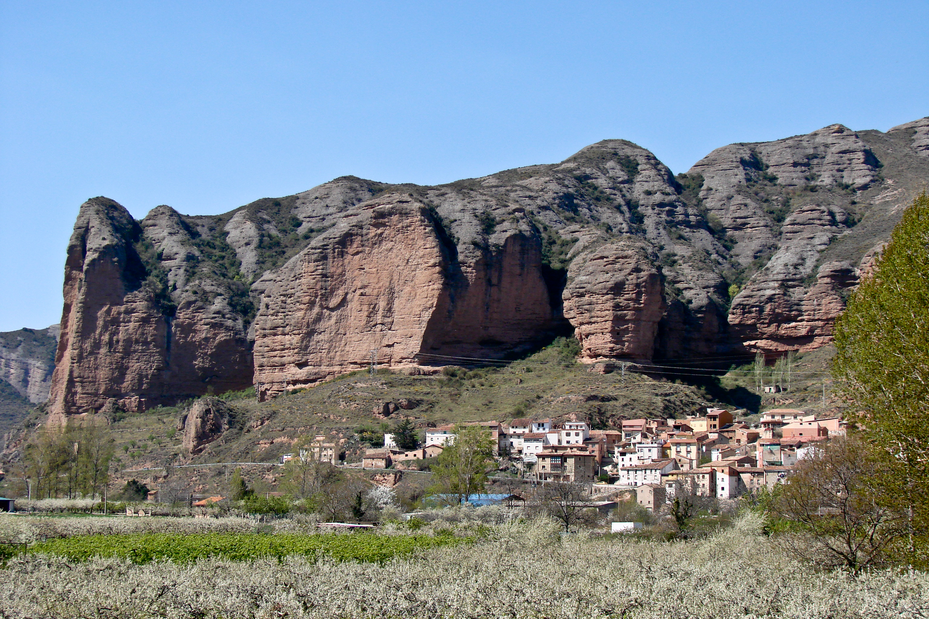 Islallana, La Rioja - España